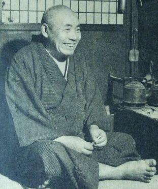 村田文三（民謡歌手）